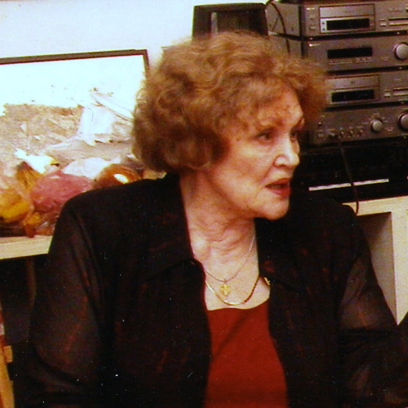 Засідання журі фестивалю "Відкрита ніч" за участі Ліни Костенко та Юрія Андруховича. 21 червня 2003 року.